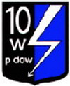 Logo 10 Wrocławskiego Pułku Dowodzenia